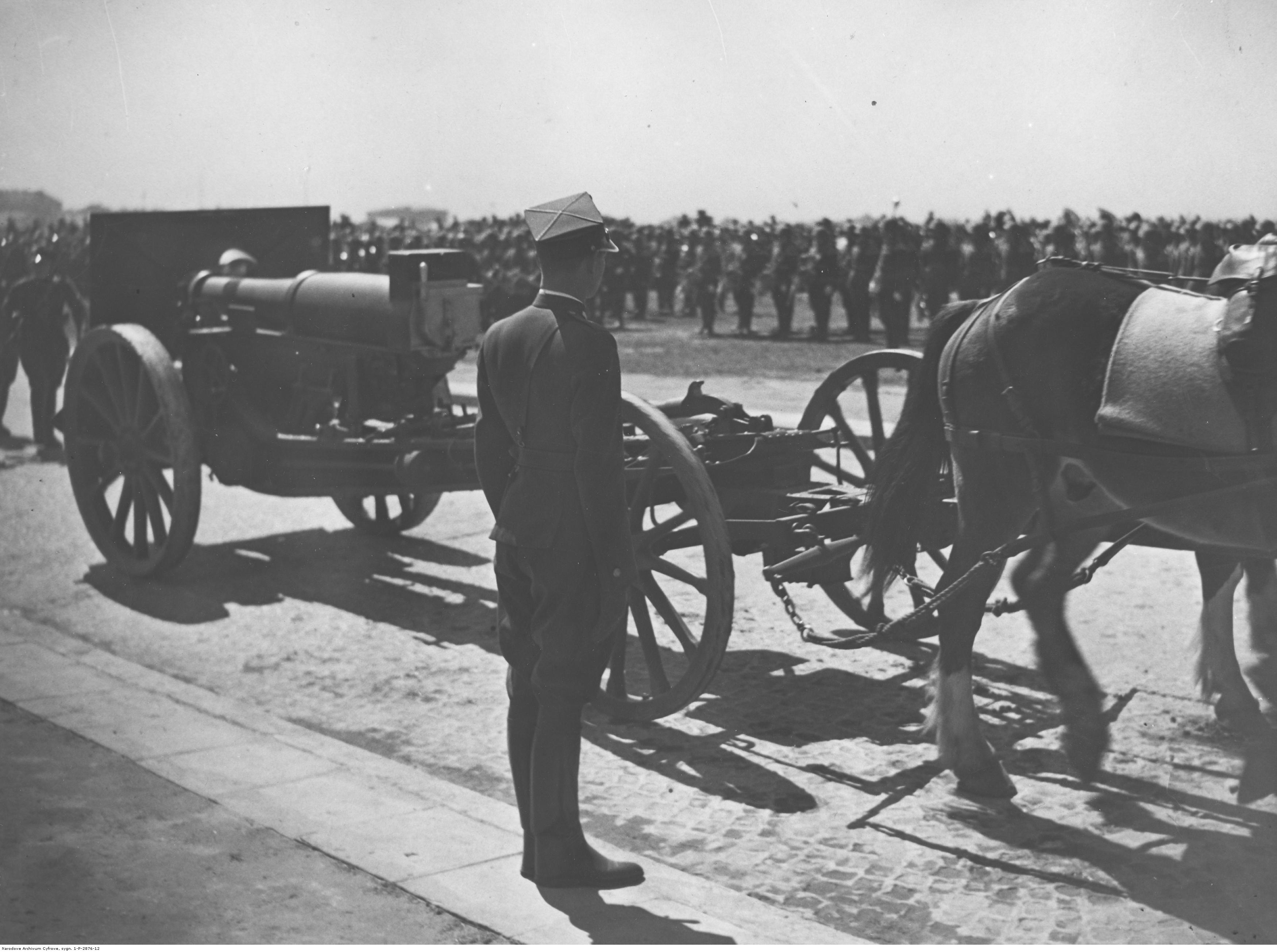 Uroczystości święta 3 Maja w Warszawie w 1938 r. Rewia wojskowa na Polu Mokotowskim. Defilada oddziałów artylerii - widoczna 155 mm haubica Schneider wz. 1917. Koncern Ilustrowany Kurier Codzienny - Archiwum Ilustracji. Sygnatura: 1-P-2876-12